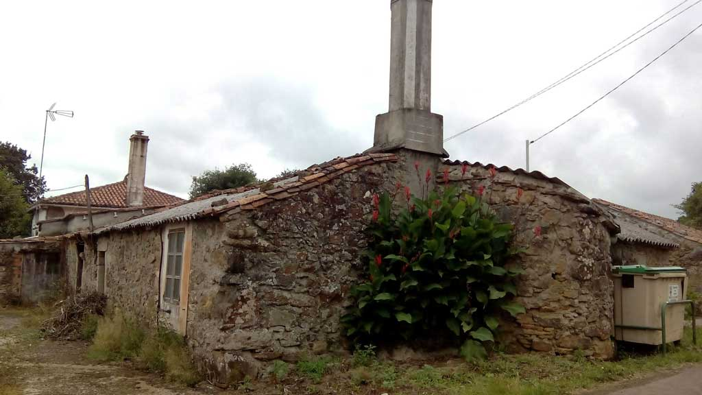 Imaxe de Chacente, Curtis.